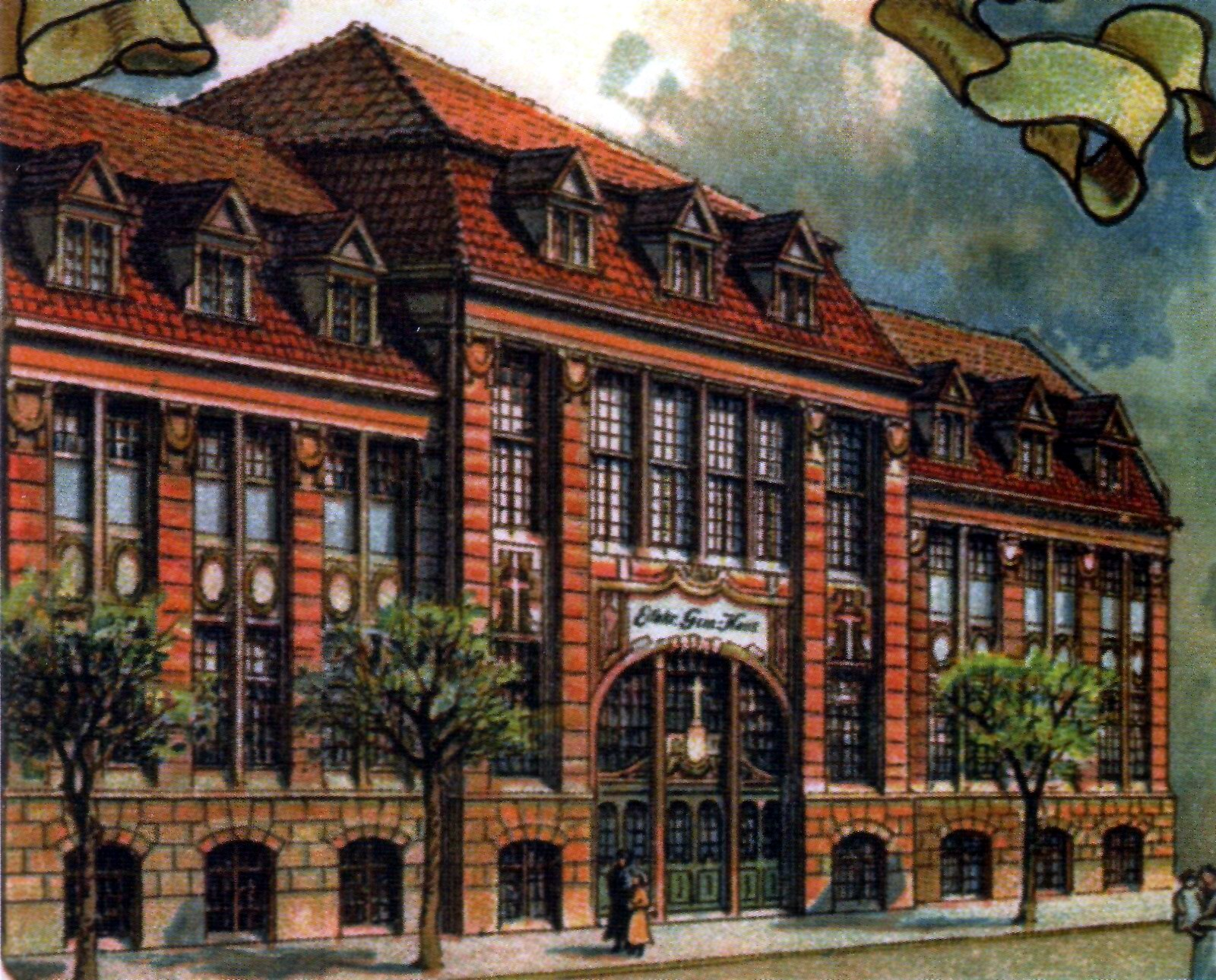 Eilbeker Gemeindehaus in Hamburg, Friedenstraße, erbaut 1908, zerstört 1943, kolorierte Postkarte